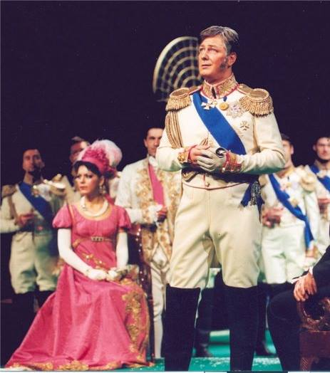 Владимир Кудашев в роли князя Гремина. Опера "Евгений Онегин" в театре "Новая опера"